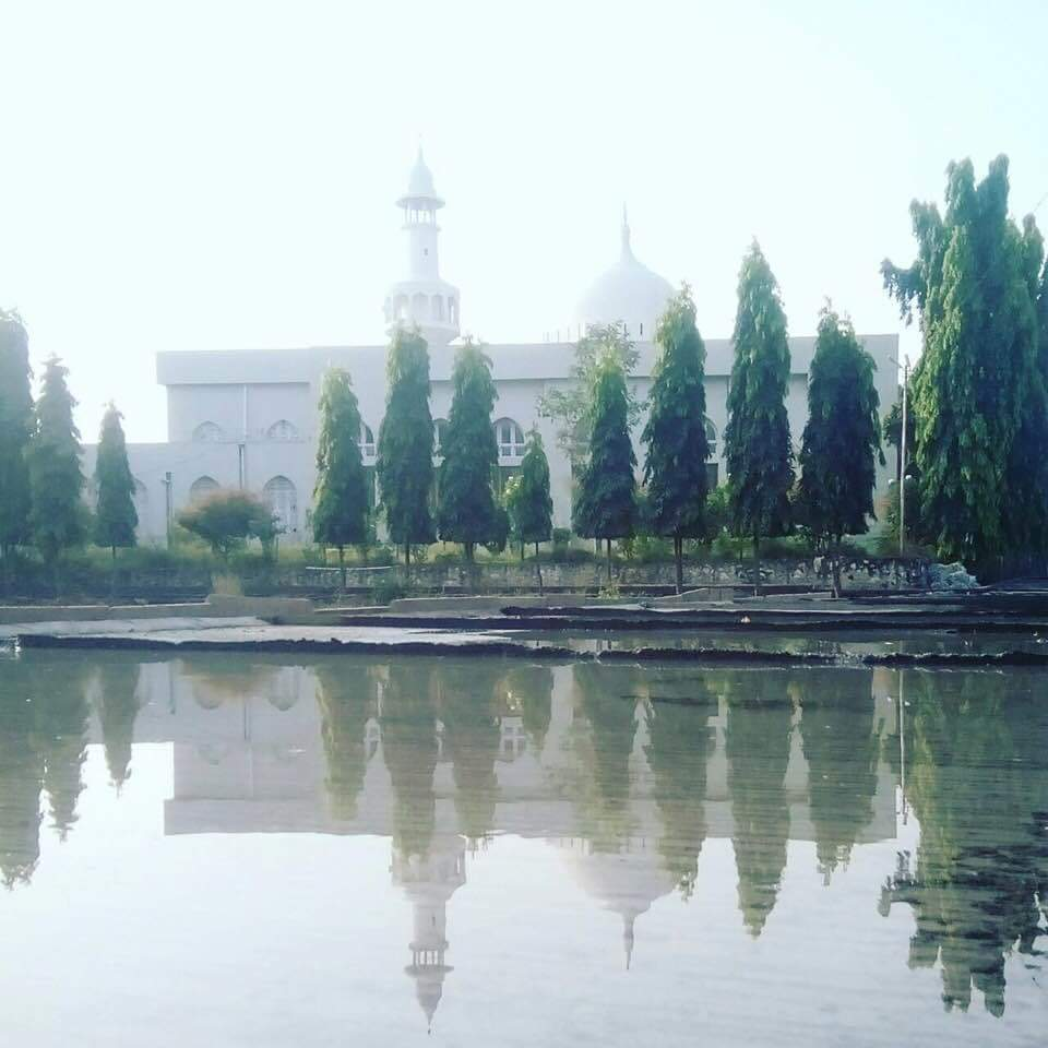 صورة عكسية للمسجد في ماء المطر